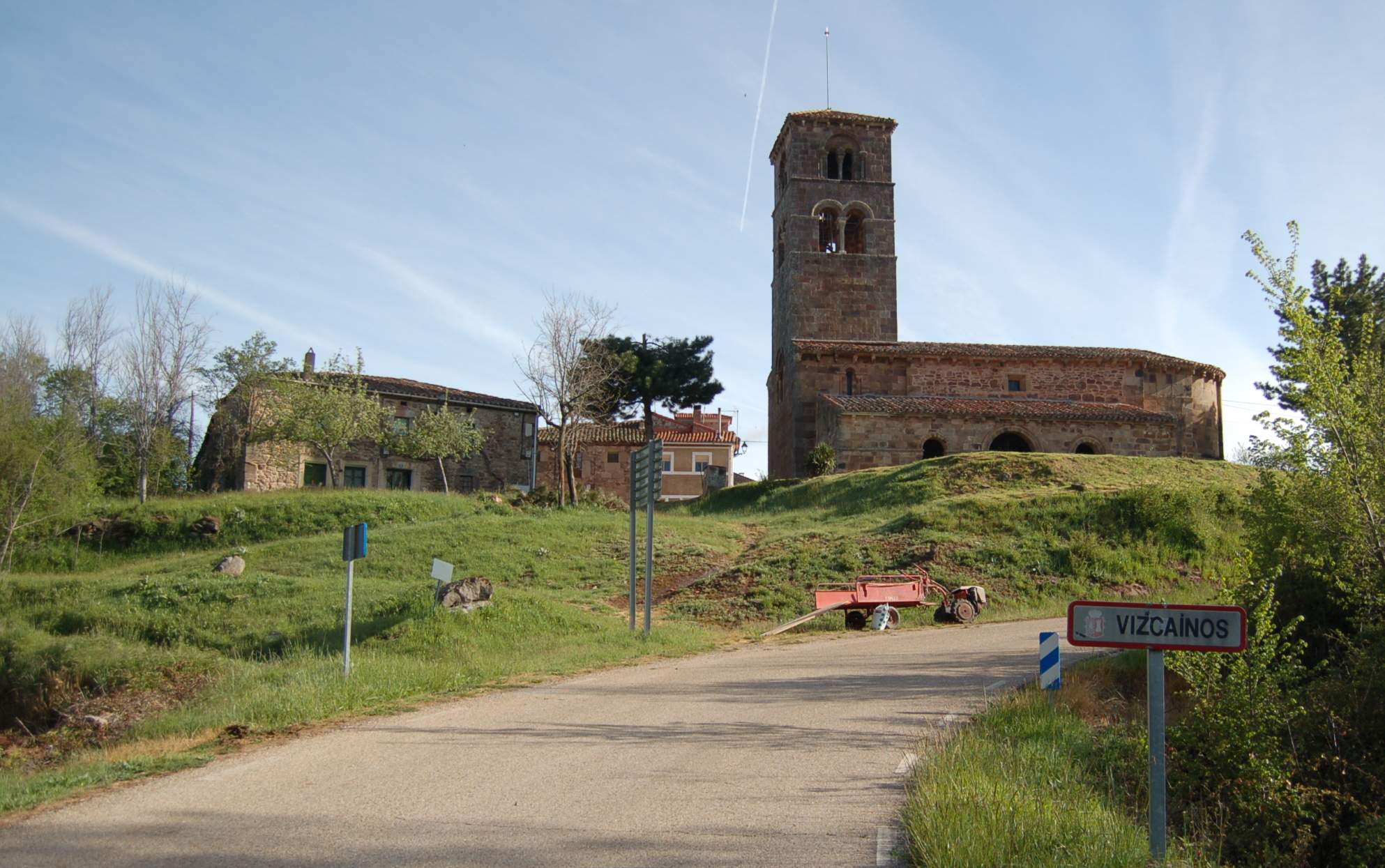 Vista de la iglesia de Vizcaínos